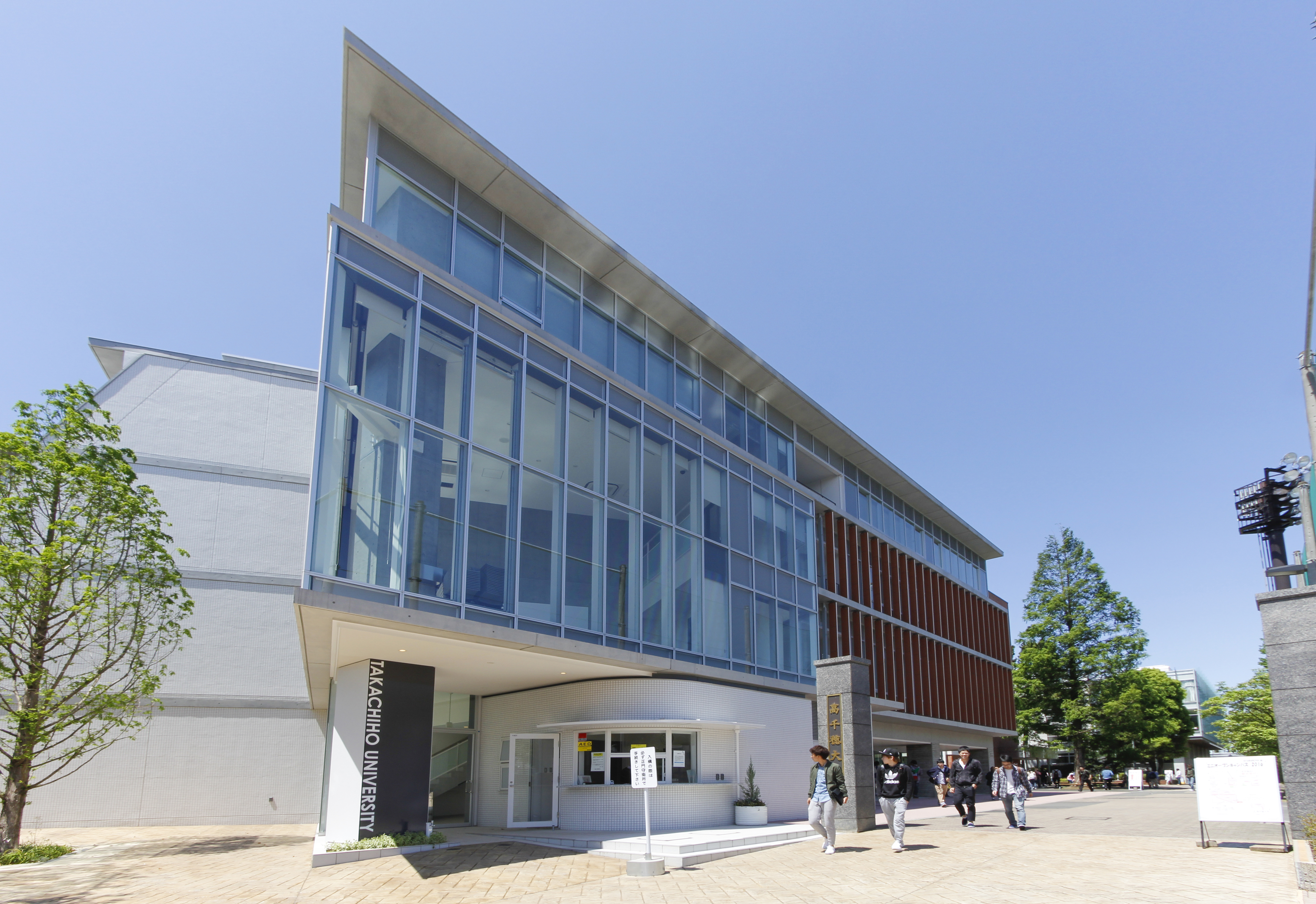 2015年10月に竣工した1号館